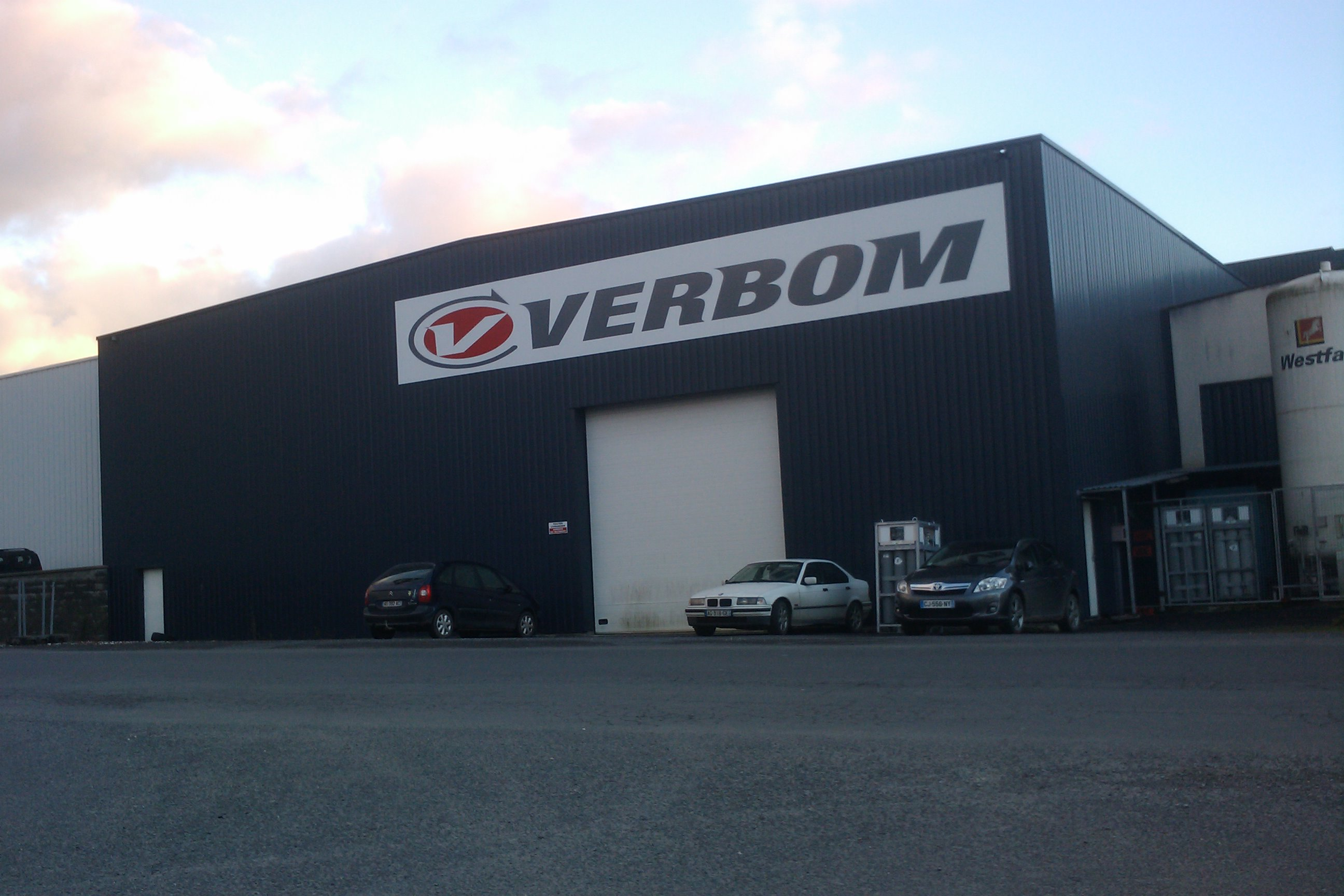 Bâtiment de l'entreprise Verbom